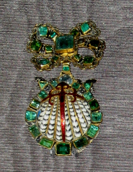 Орден Сантьяго, 17 век. Испания.